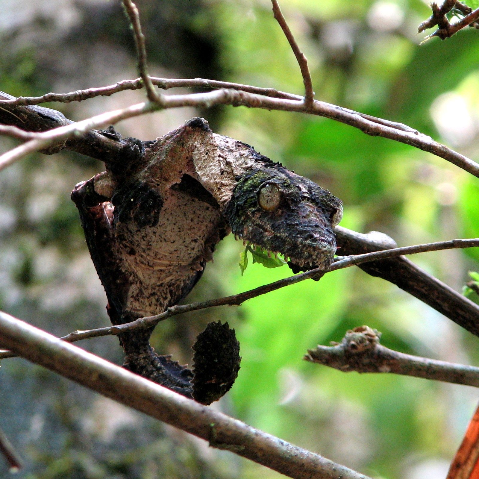 Plattschwanzgecko (Uroplatus sp.) im Ranomafana National Park (Madagaskar). Tagsüber verharrt er regungslos in dieser Stellung.